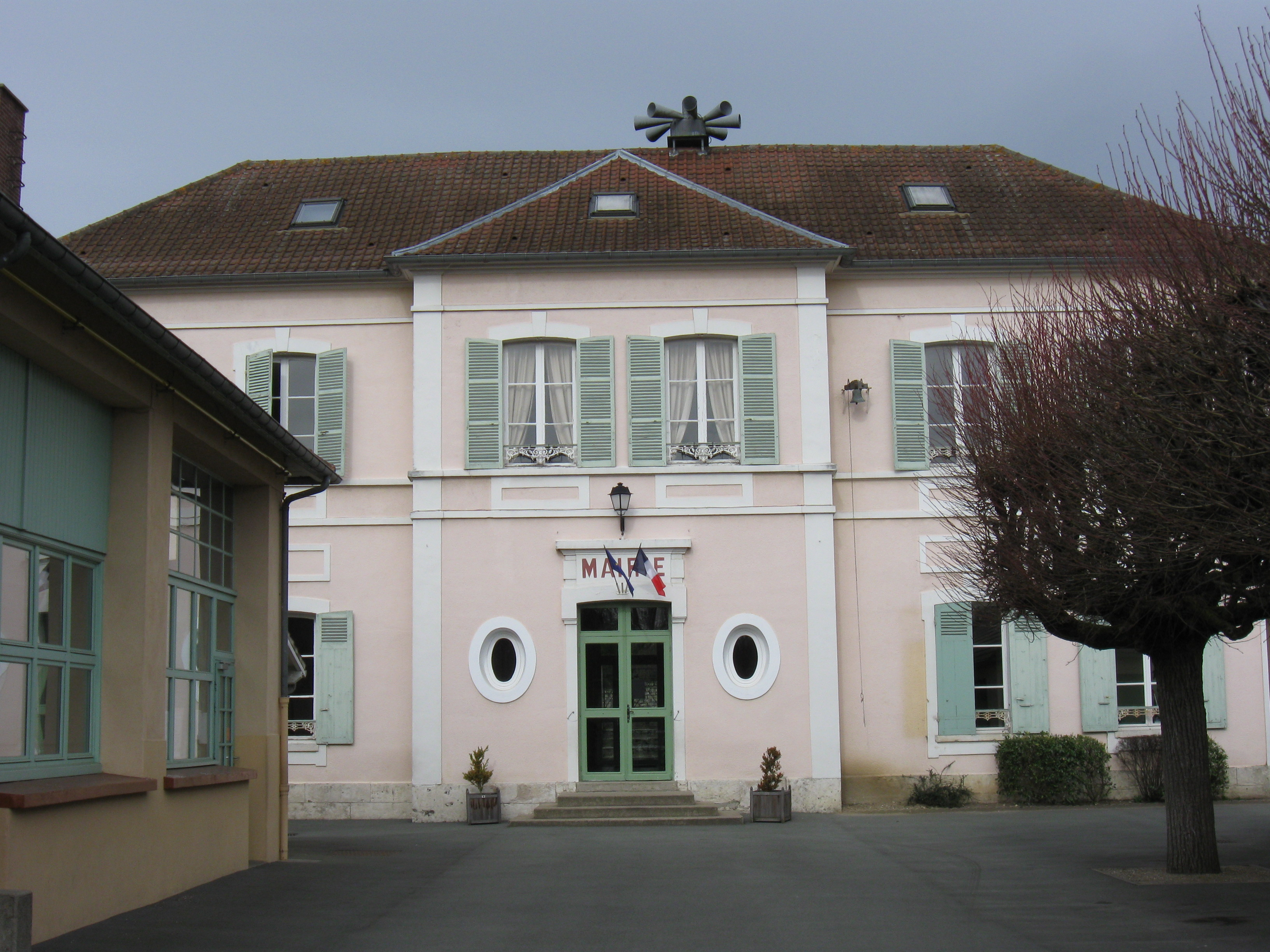 Mairie de Bennecourt. (département des Yvelines, région Île-de-France).